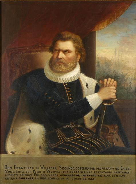 Francisco de Villagra (1511-1563), conquistador español, gobernador de Chile La Colecciòn de Retratos de los Presidentes del Coloniaje. The collection of Portraits of the Governors of Chile is in the Museo Histórico Nacional (Chile) and was commissioned by Benjamín Vicuña Mackenna for the 1873 Colonial Exhibition and painted by various artists. It replaces a series of portraits of Chile's colonial governors dating from the colonial era which was destroyed during the wars for independence. [1].